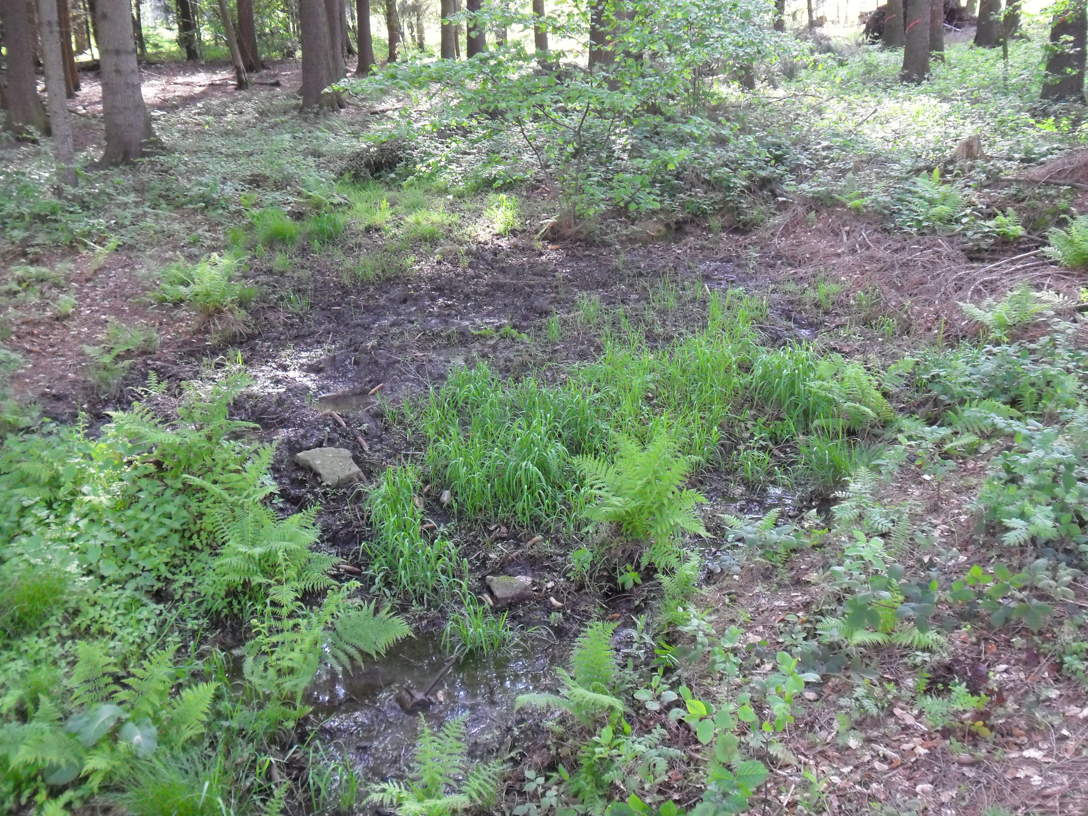 Quelle Kotitzer Wasser - am Osthang des Richtersberges, auf 360 m über NN